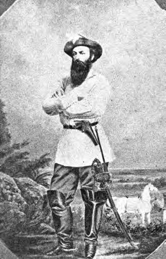 Antonio Guzmán Blanco. Colección Personajes del siglo XIX, Archivo Audiovisual de la Biblioteca Nacion